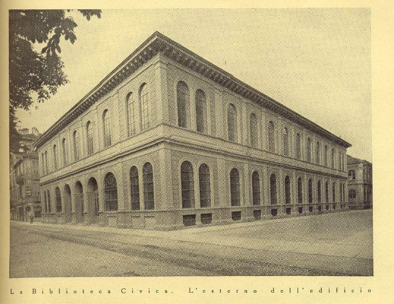 La facciata della Biblioteca civica centrale di Torino nel 1929. Lato verso Corso Palestro e Via Bertrandi